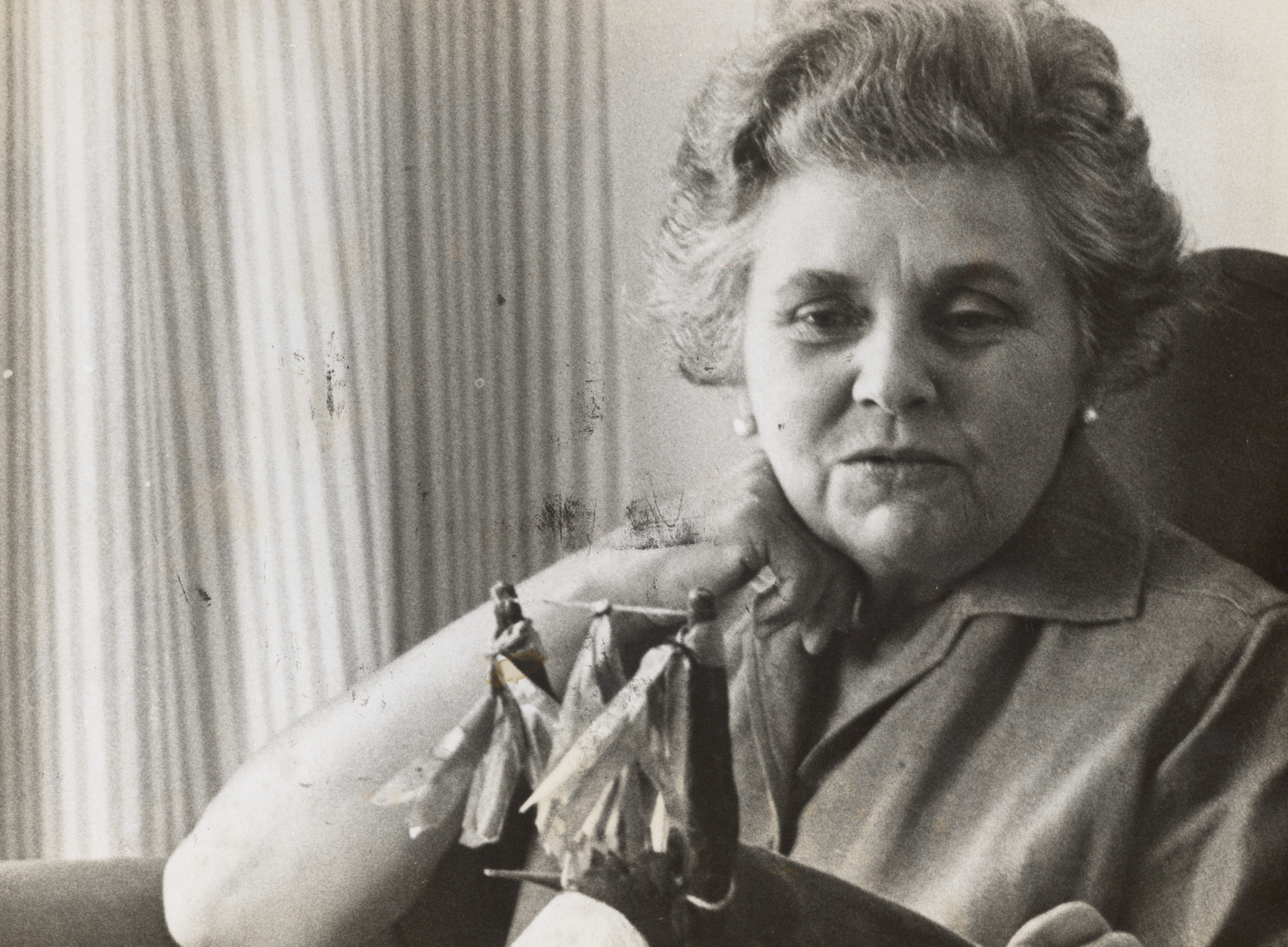 Fundo Correio da Manhã.